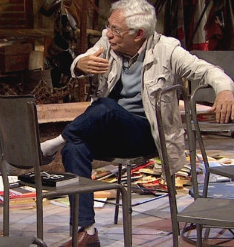 ladimir Carvalho (Itabaiana, 31 de janeiro de 1935) é um cineasta e documentarista brasileiro de origem paraibana.